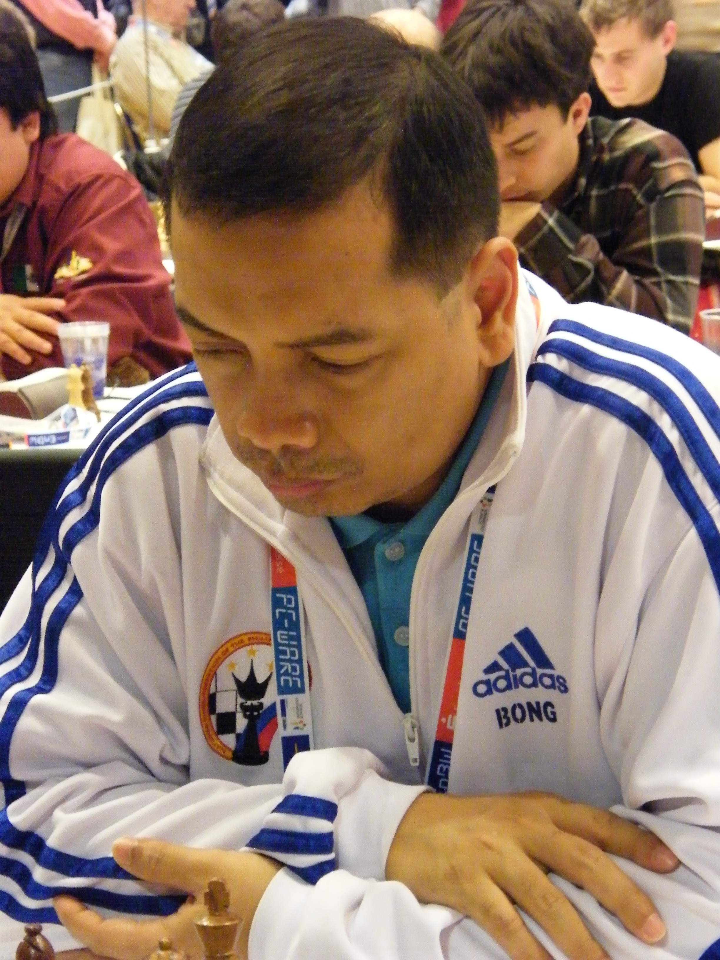 GM Buenaventura Villamayor bei der Schacholympiade 2008 in Dresden